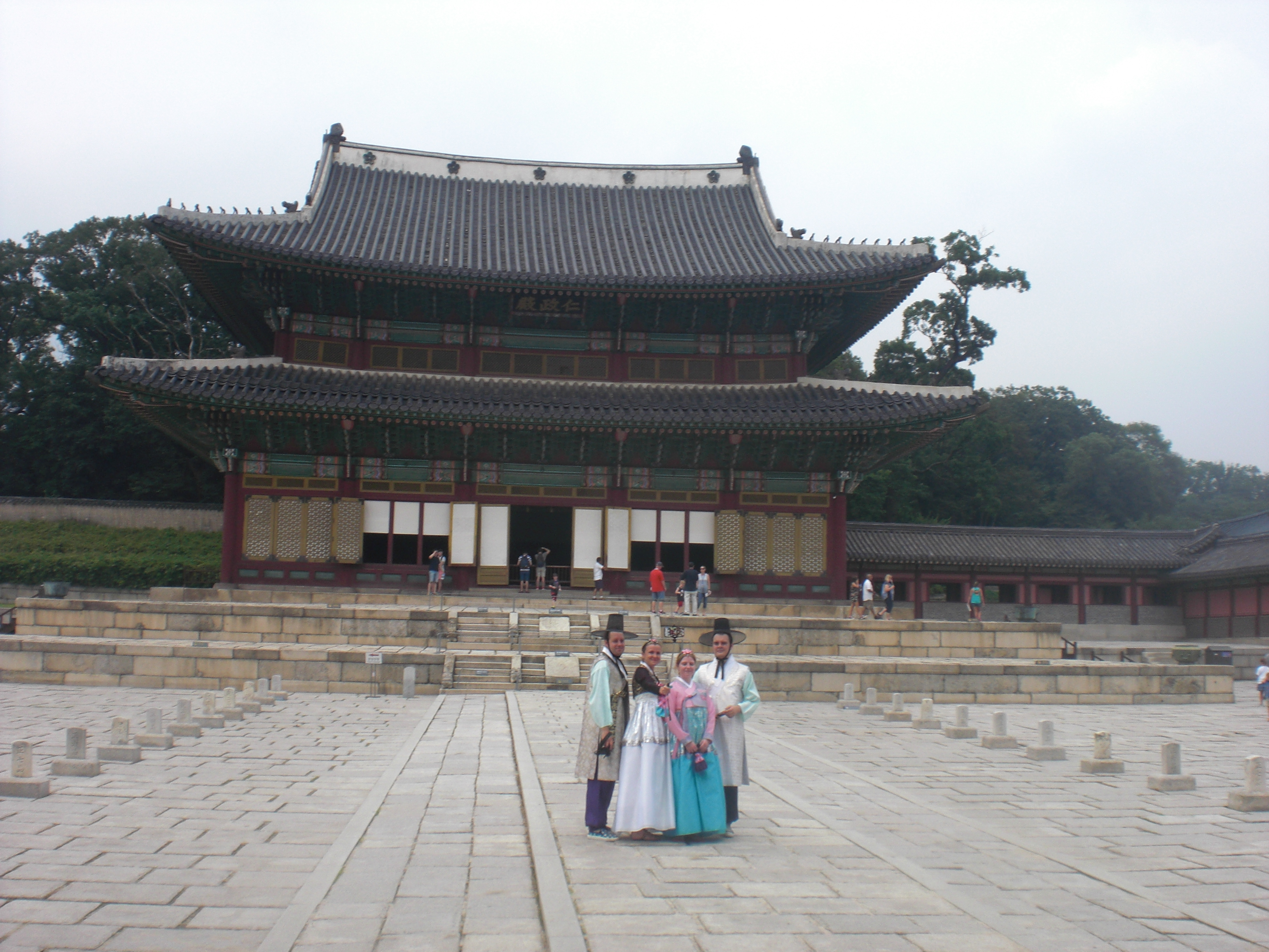 Hanbok en Changdeokgung.